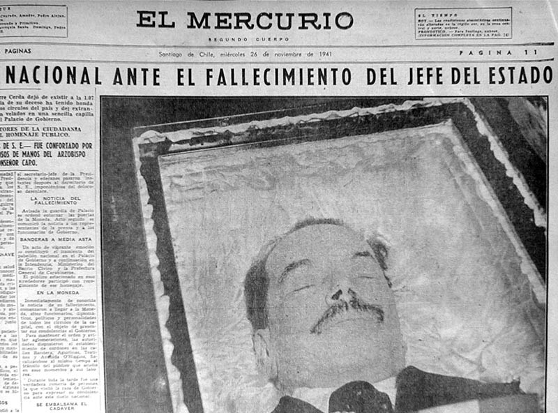 Portada de El Mercurio tras la muerte de Pedro Aguirre Cerda.